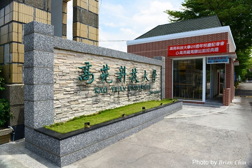 中文（台灣）: 高苑科技大學高苑鐵馬驛站。